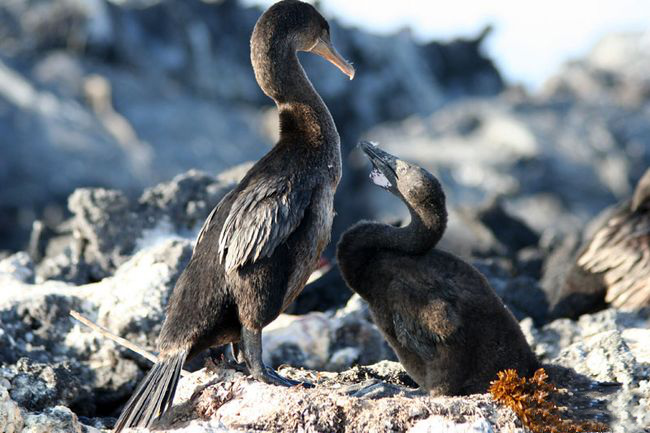 Cormoran aptère